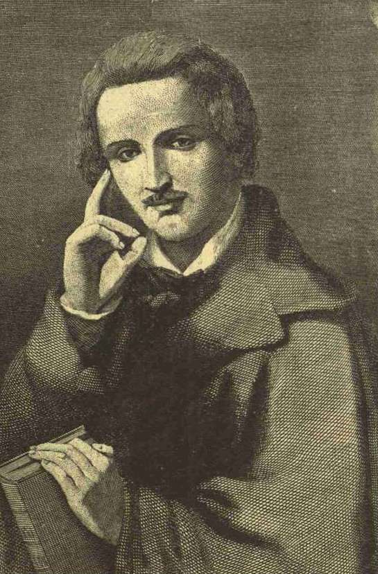 grafika z książki PL - Album biograficzne zasłużonych Polaków wieku XIX t.1 publikacja Marii Chełmońskiej Warszawa 1901